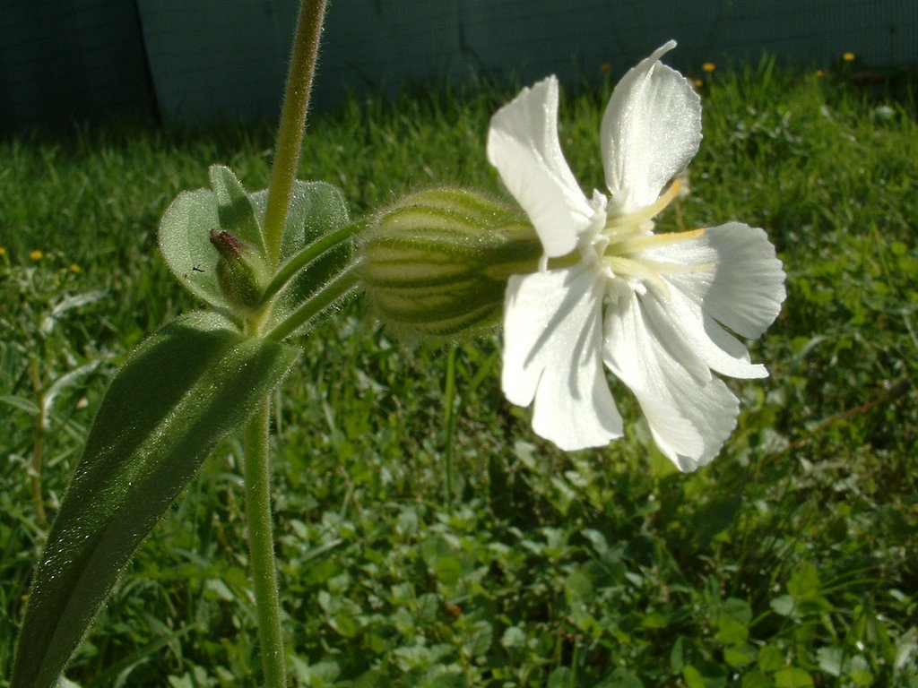 compagnon blanc (silene latifolia) pris en isere. silene latifolia taken in isere (France)